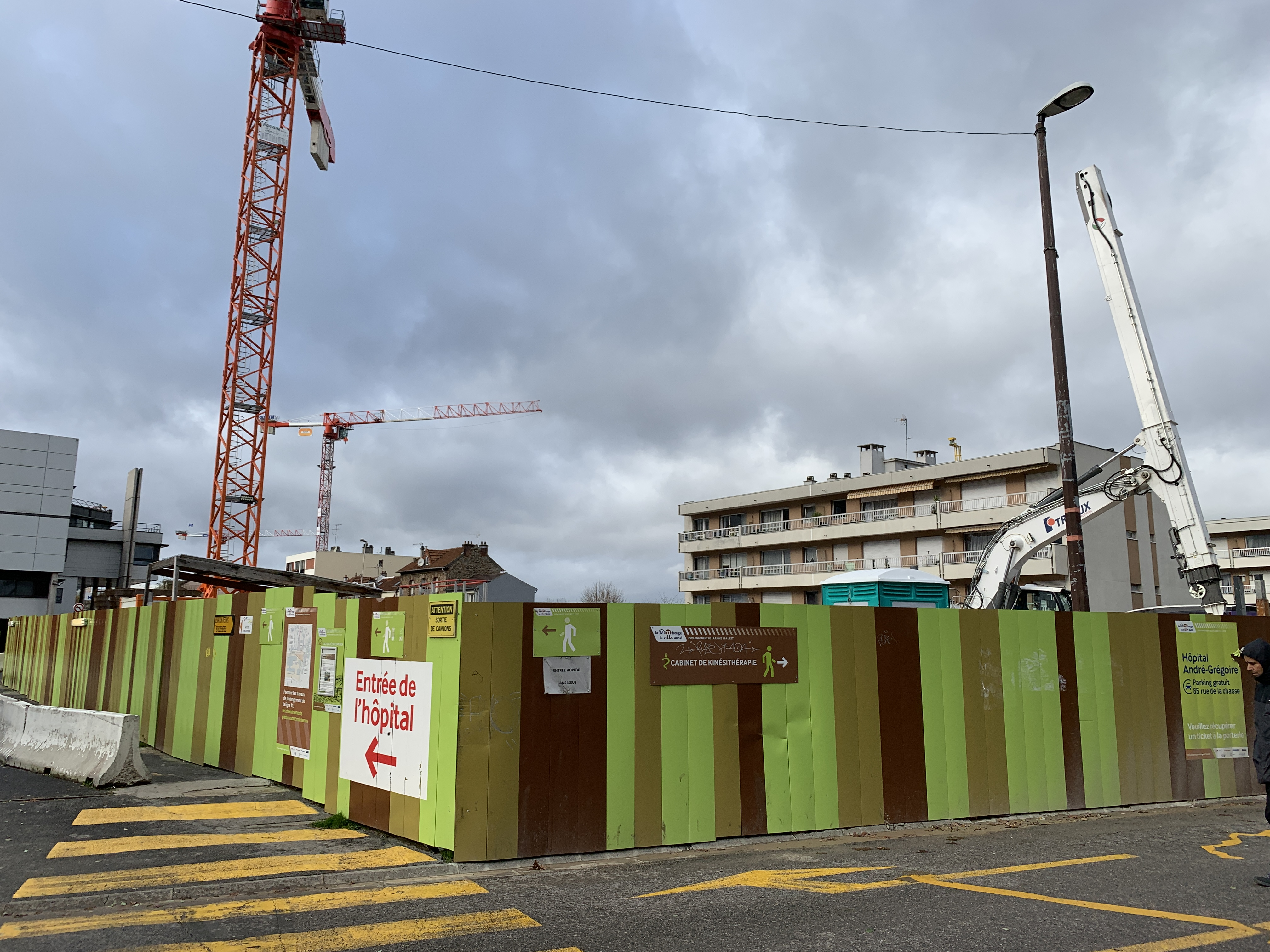 Chantier de construction de la station de métro Montreuil - Hôpital pour la ligne 11, Montreuil, Seine-Saint-Denis.